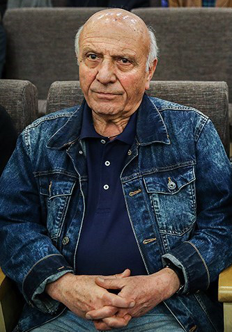 نصرالله مدقالچی ۲۱ فروردين ۱۳۹۷